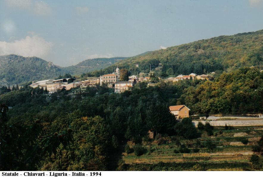 Statale - Chiavari - Italia - 1994 - Ristorante rinomato. Panorama.